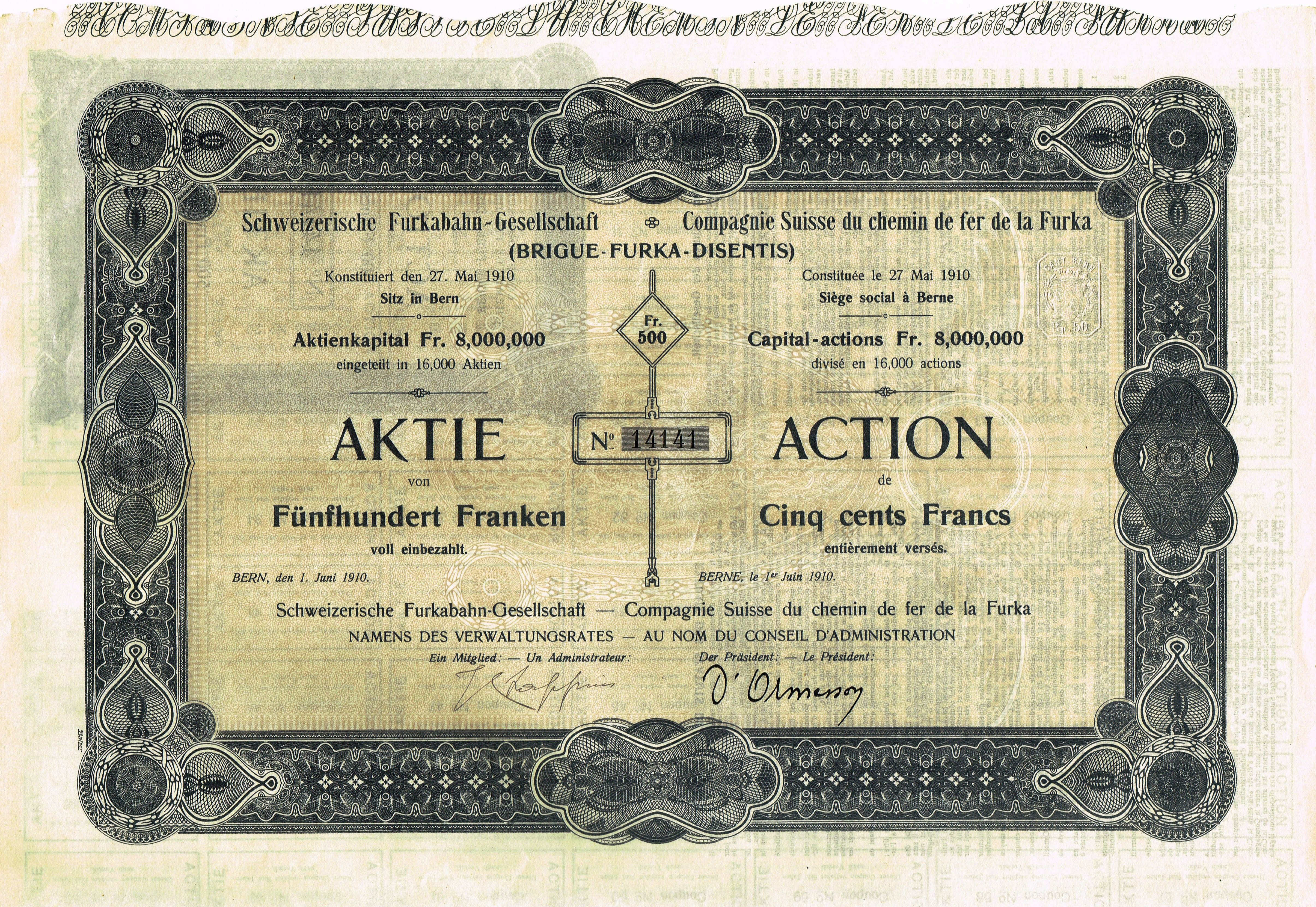 Aktie über 500 Franken der Schweizerischen Furkabahn-Gesellschaft / Compagnie Suisse du chein de fer de la Furka vom 1. Juni 1910